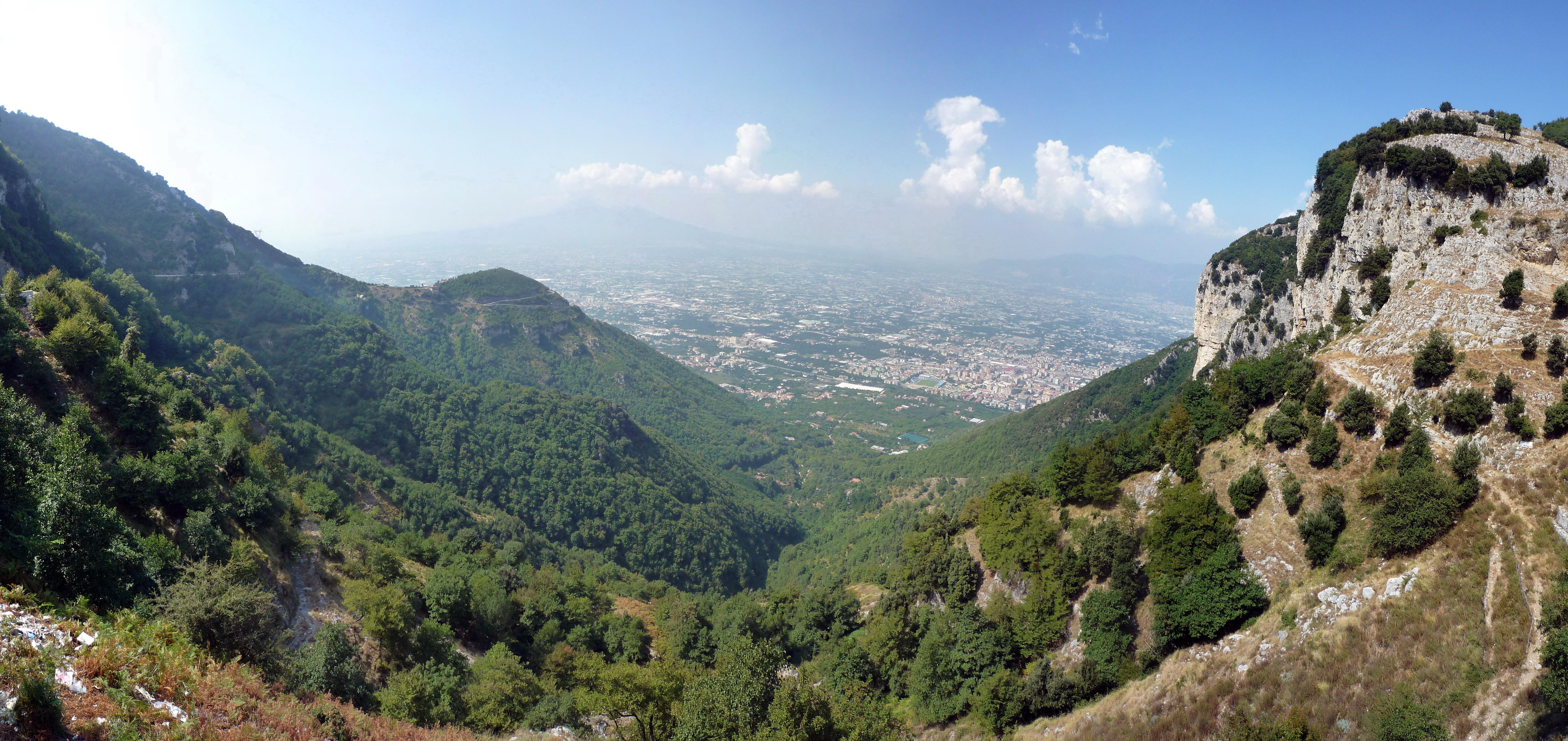 Monte di Chiunzi pass